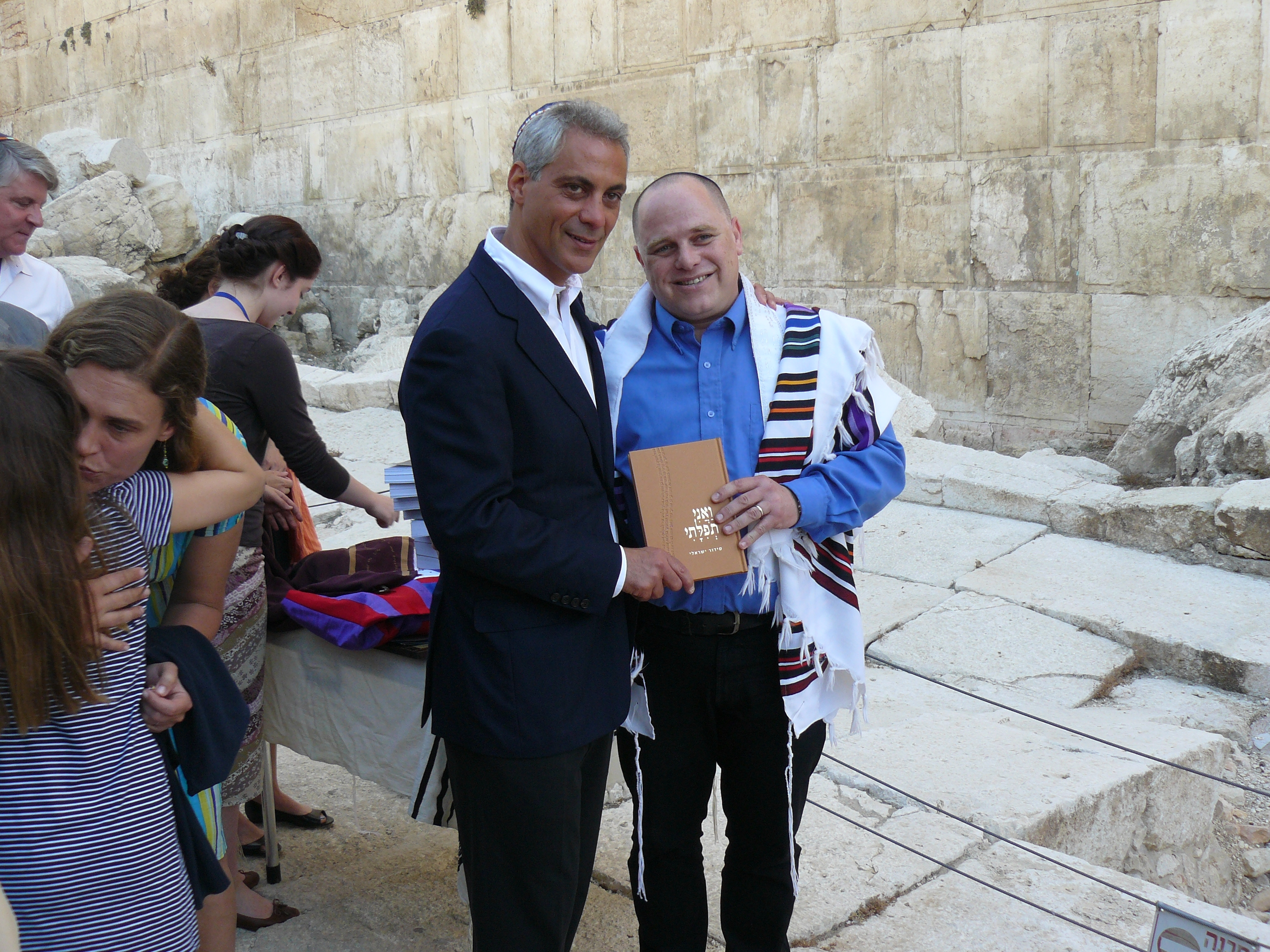 יזהר הס עם רם עמנואל